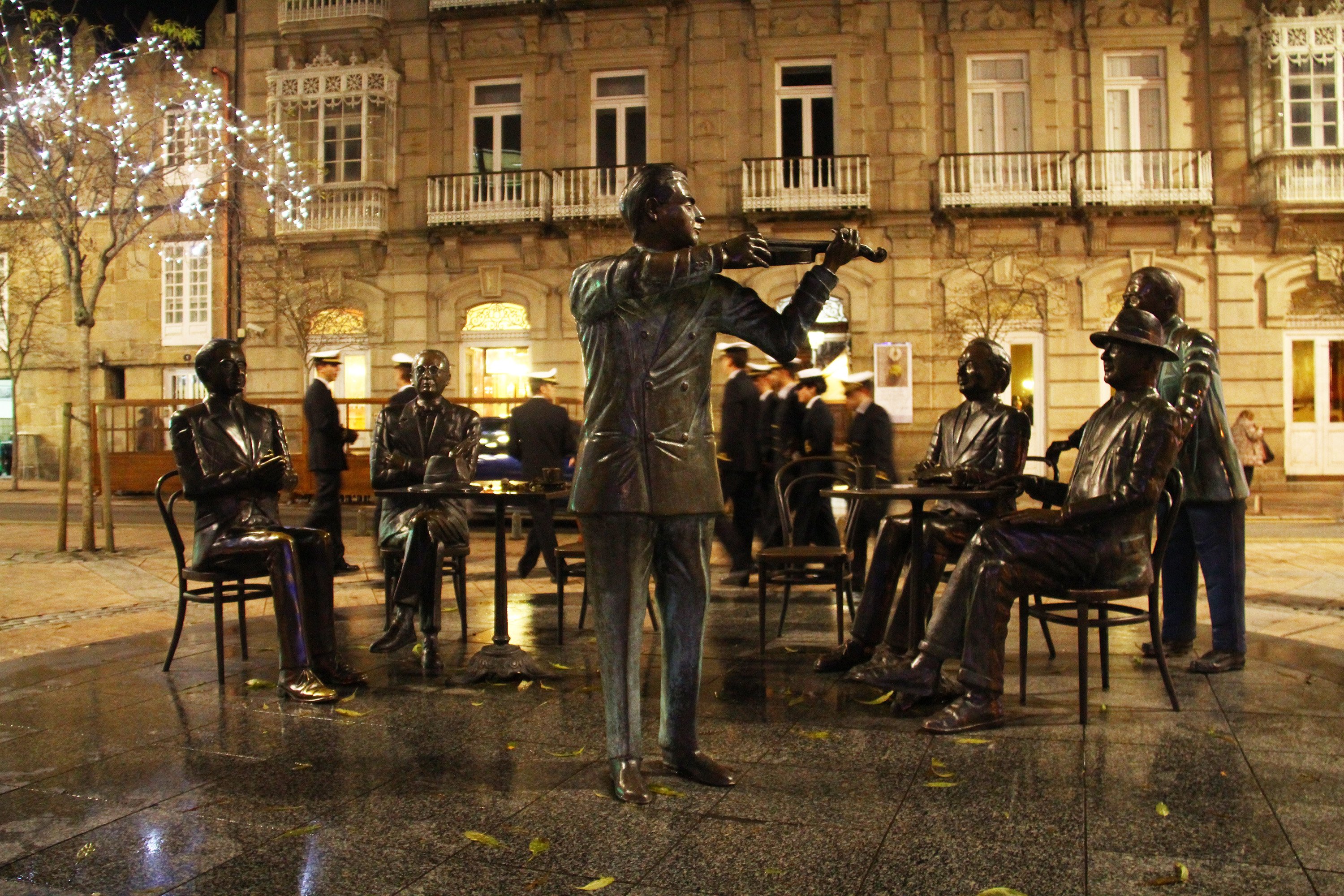 El conjunto escultórico "La Tertulia", obra del escultor vasco César Lombera, situado desde 2006 ante el antiguo Café Moderno de la ciudad Pontevedra (Galicia, España), en la Plaza de San José. El conjunto está formado por las siguientes esculturas: en pie y en primer plano, el violinista Manuel Quiroga Losada; y detrás de él, de izquierda a derecha, Alexandre Bóveda, Alfonso Rodríguez Castelao, Valentín Paz Andrade y Ramón Cabanillas Enríquez; detrás de estos dos últimos, apoyado en sus sillas, vemos a Carlos Casares Mouriño. En el momento de hacer esta foto pasaba un grupo de marinos de la Escuela Naval Militar de Marín detrás del conjunto escultórico. Venían del concierto de Navidad de la Escuela, que tuvo lugar esa tarde en el auditorio de Afundación, situado allí cerca. Pontevedra: pundits and sailors The sculpture "La Tertulia" (The Bull Session), a work by the Basque sculptor César Lombera, located since 2006 in the old Modern Coffee of the city of Pontevedra (Galicia, Spain), in San José Squaee. The set consists of the following sculptures: in the foreground, the violinist Manuel Quiroga Losada; and behind him, from left to right, Alexandre Bóveda, Alfonso Rodríguez Castelao, Valentín Paz Andrade and Ramón Cabanillas Enríquez; behind these last two, leaning on their chairs, is Carlos Casares Mouriño. At the time of this photo a group of sailors from the Naval Military School of Marín passed behind the sculpture. They came from the Christmas concert of the School, which took place this afternoon in the auditorium of Afundación located nearby.